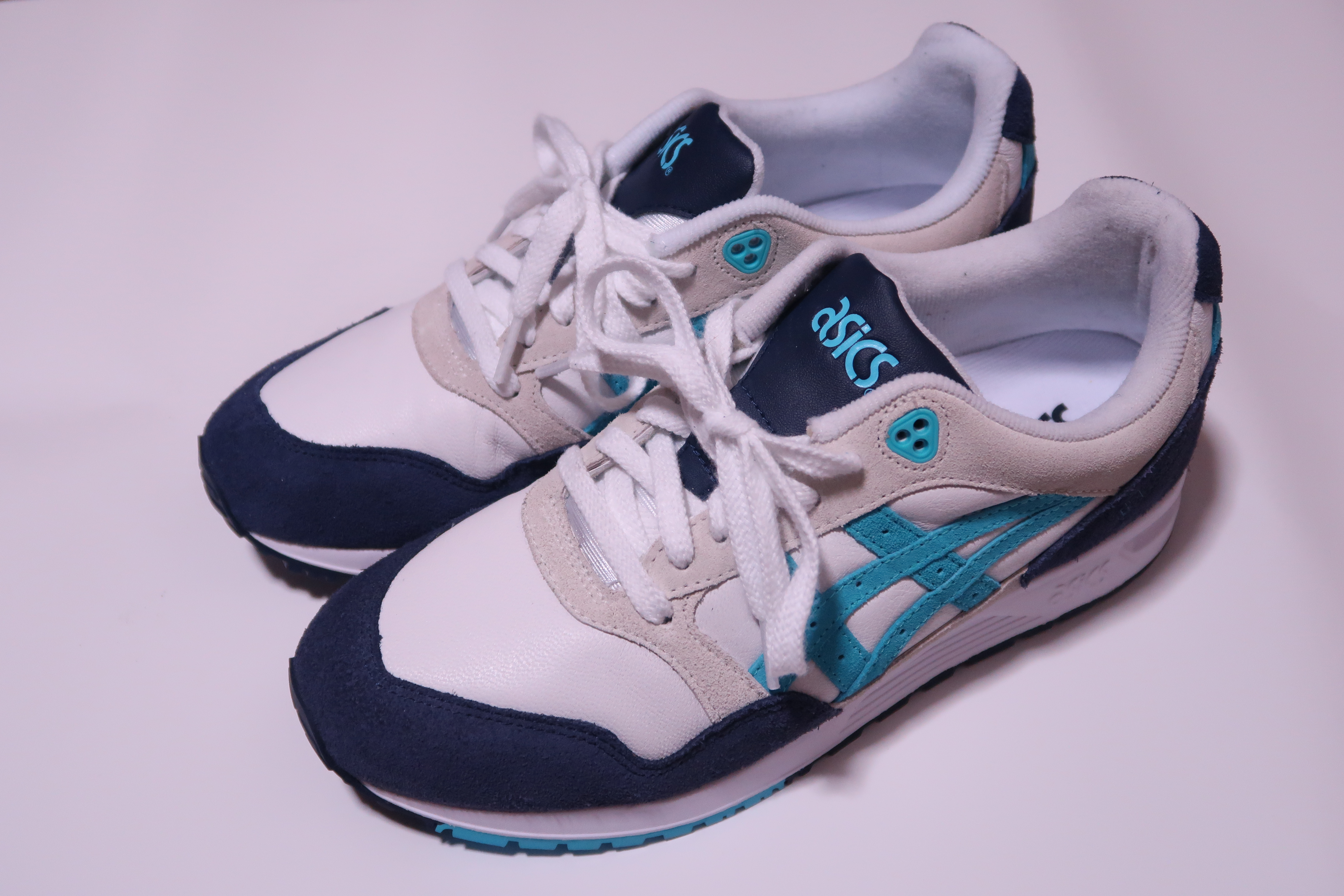 アシックスASICSのスニーカーゲルサガ